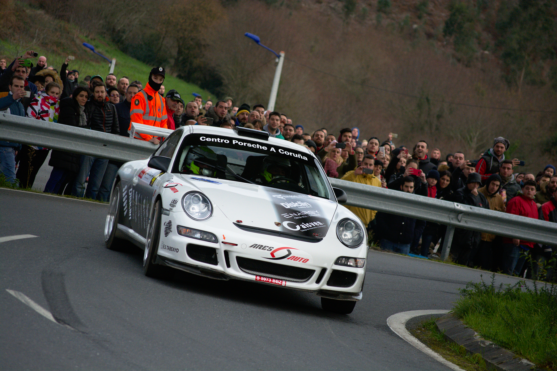 Iván Ares, Rally de A Coruña 2017